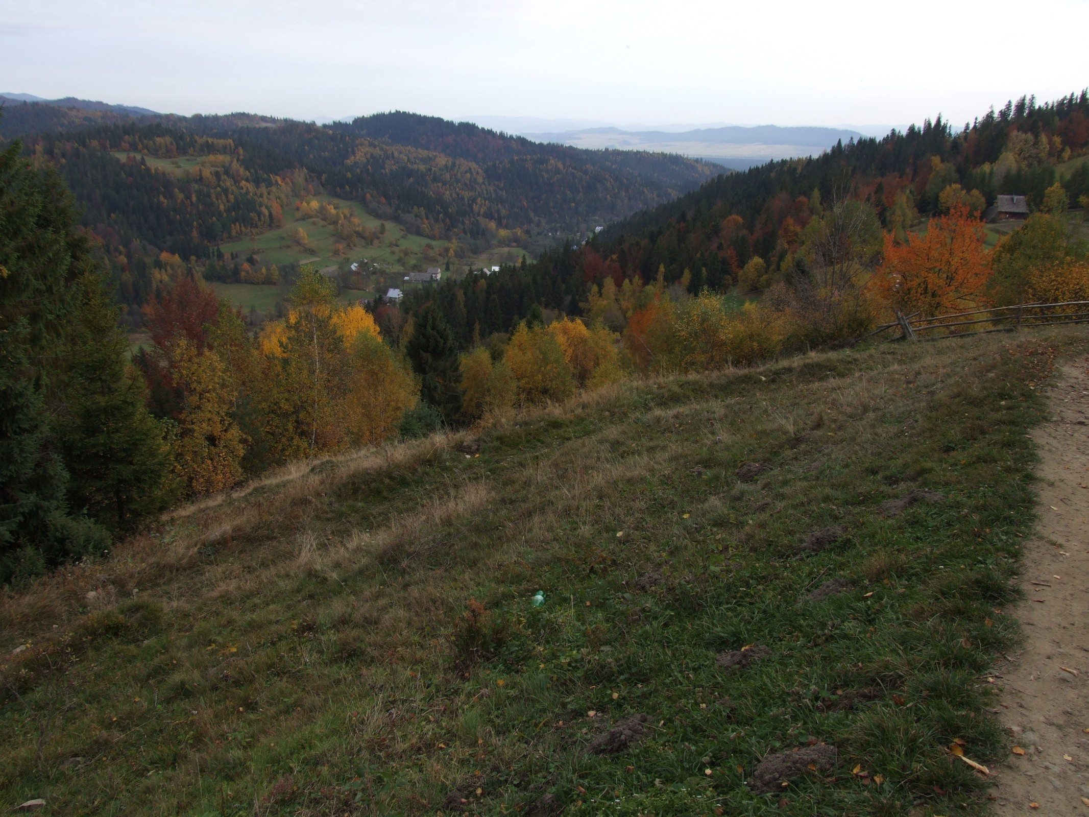 Łopuszna. Widok z osiedla Zarębek Wyżni na dolinę Łopuszanki